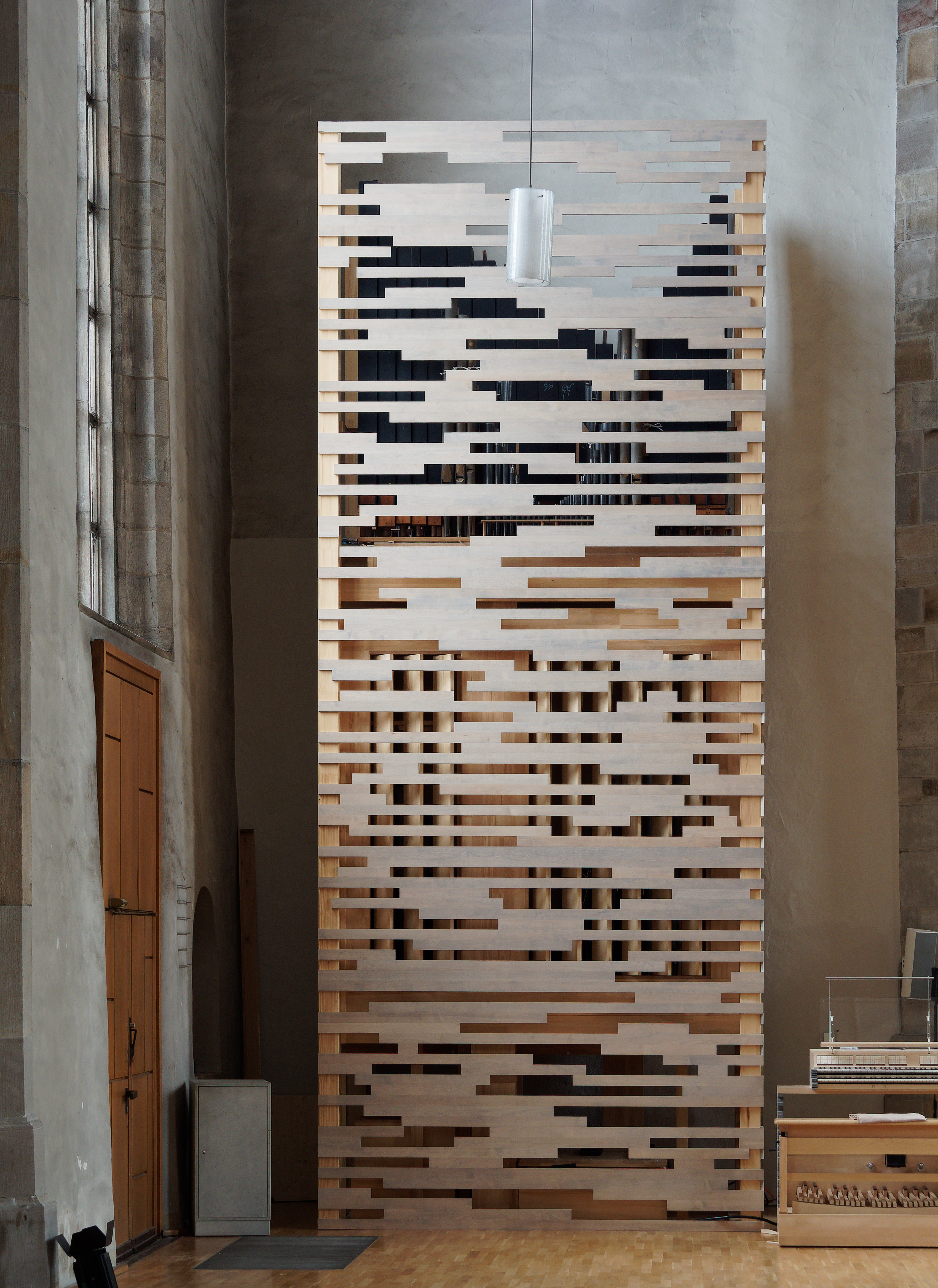 Die Orgel in der Petrikirche in Dortmund